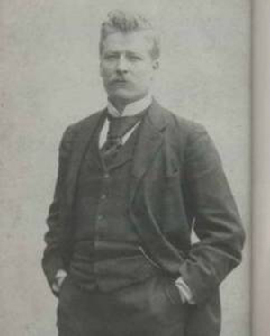 Emil Wikström. Kuva Daniel Nyblin, Visavuoren arkisto, Sääksmäki